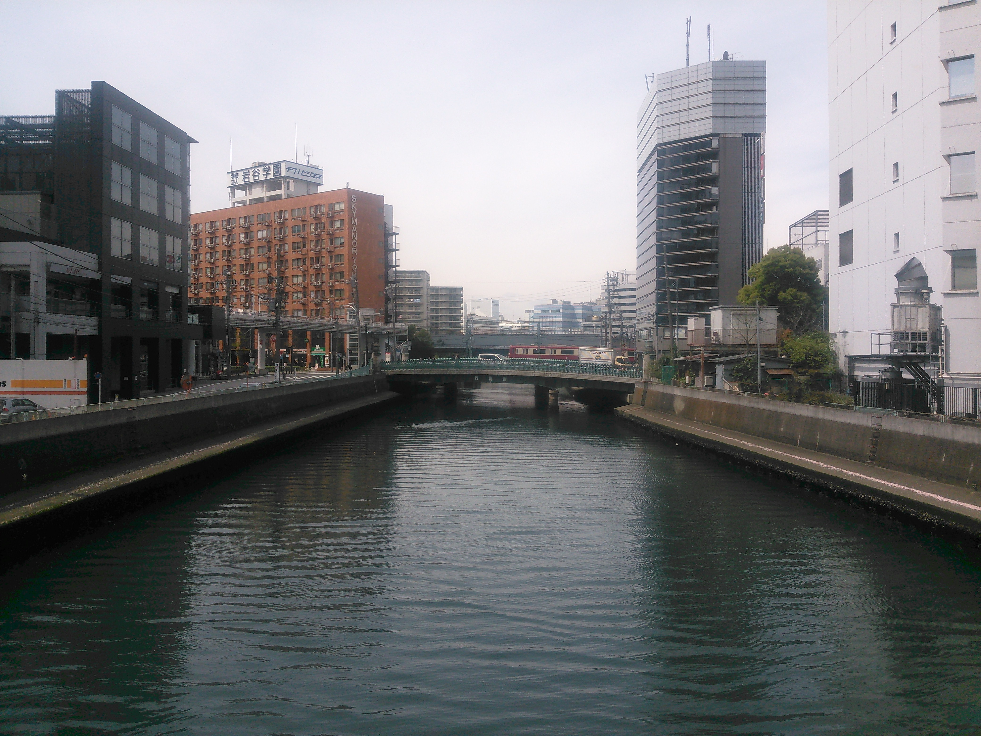 横浜市西区を流れる帷子川。中央は万里橋。築地橋より上流（西）の方向を見る。